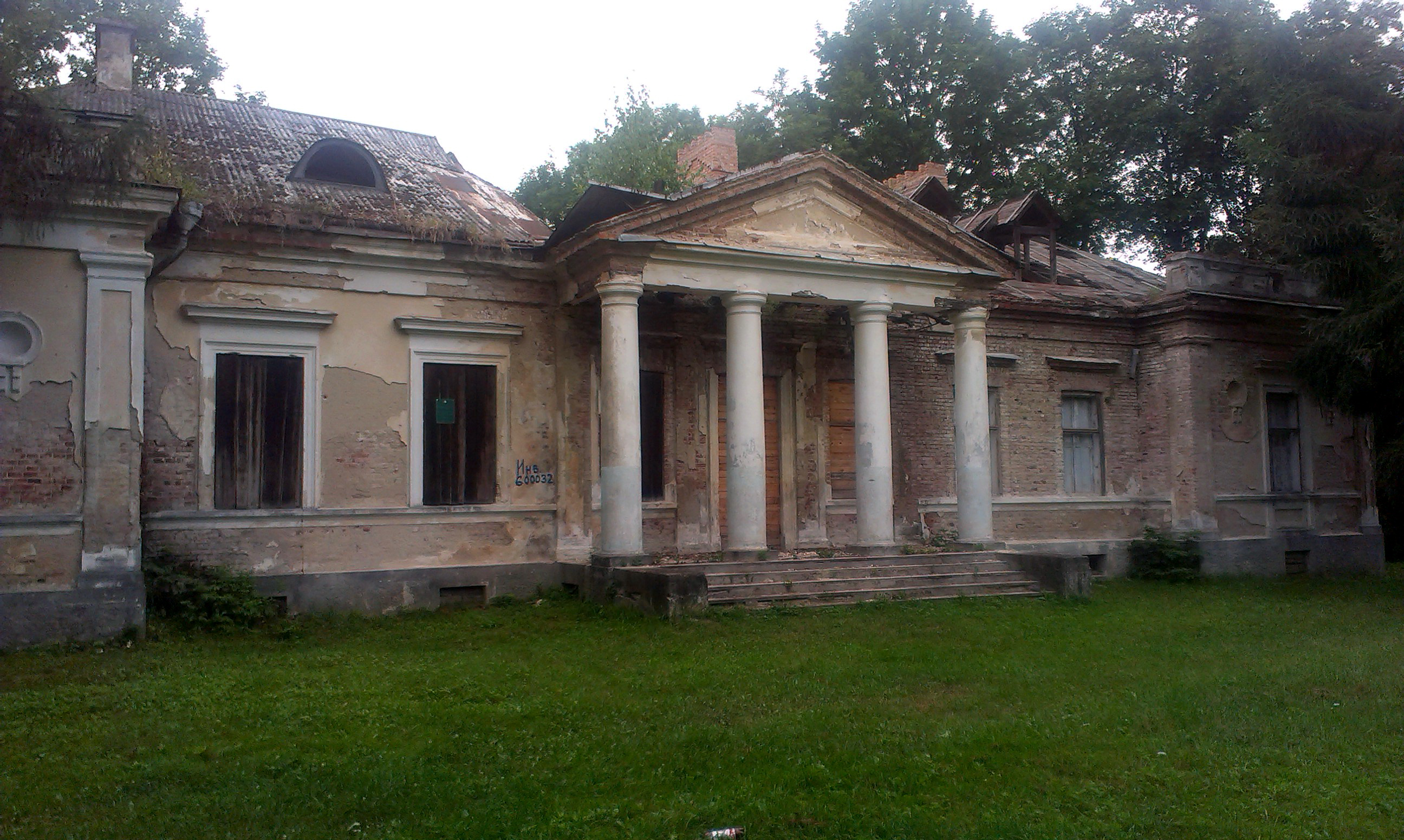 Сядзіба Пузынаў